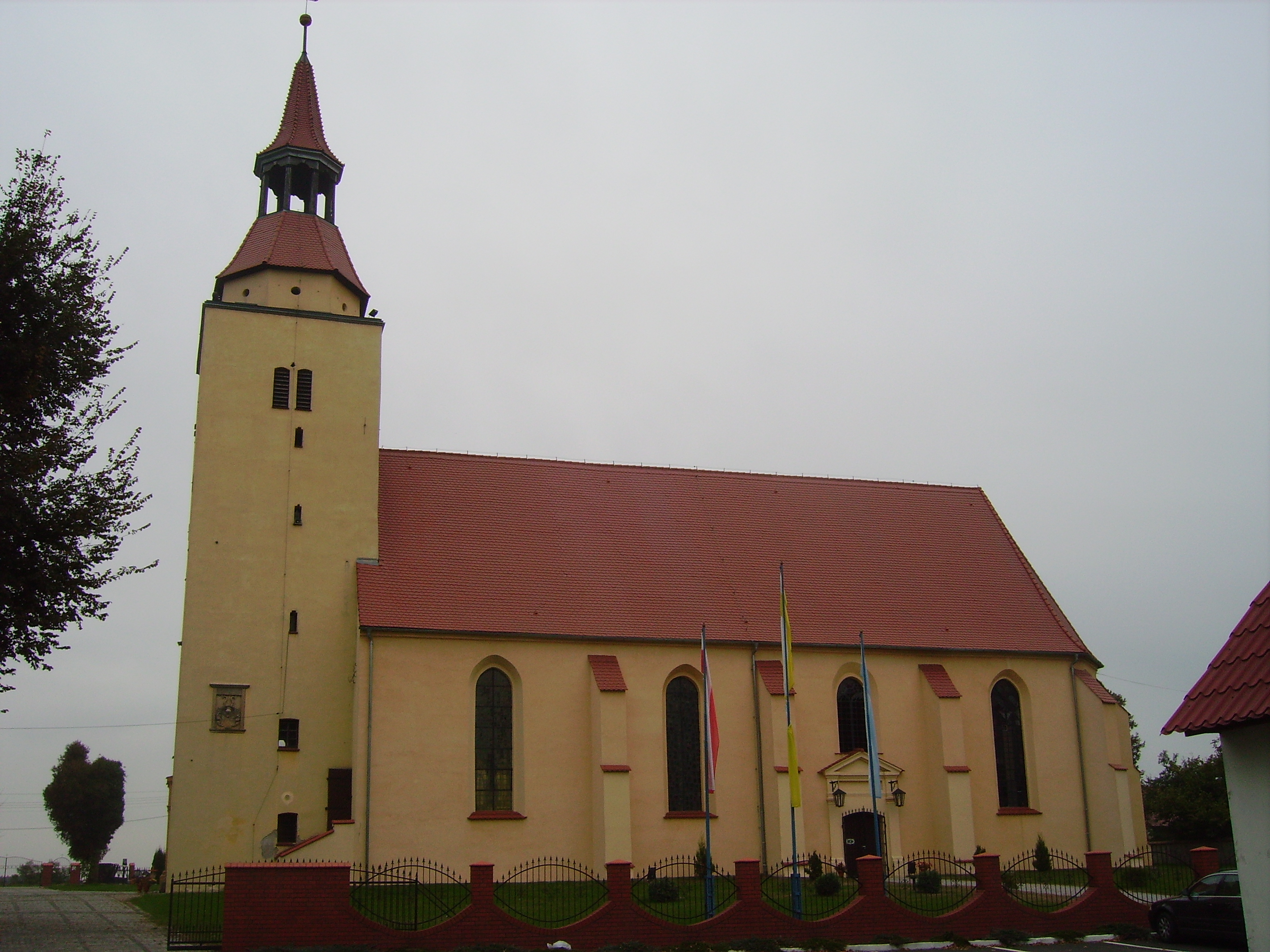 Konin Żagański,kościół filialny pod wezwaniem św. Bartłomieja, z XVI wieku, XVII wieku.